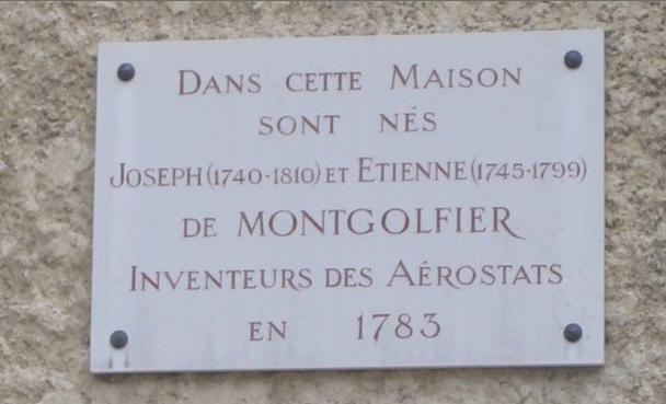 Plaque commémorative apposée sur la maison des frères Montgolfier à Vidalon-lès-Annonay (Davézieux). Abrite aujourd'hui le Musée des Papeteries Canson et Montgolfier